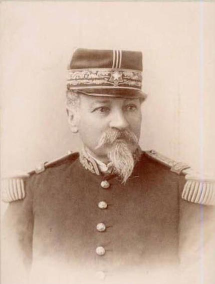 Emilio Sotomayor Baeza (* Melipilla, septiembre de 1826 - † Santiago de Chile, 17 de marzo de 1894) fue un militar chileno, que participó en forma destacada en la Guerra del Pacífico contra Perú y Bolivia.